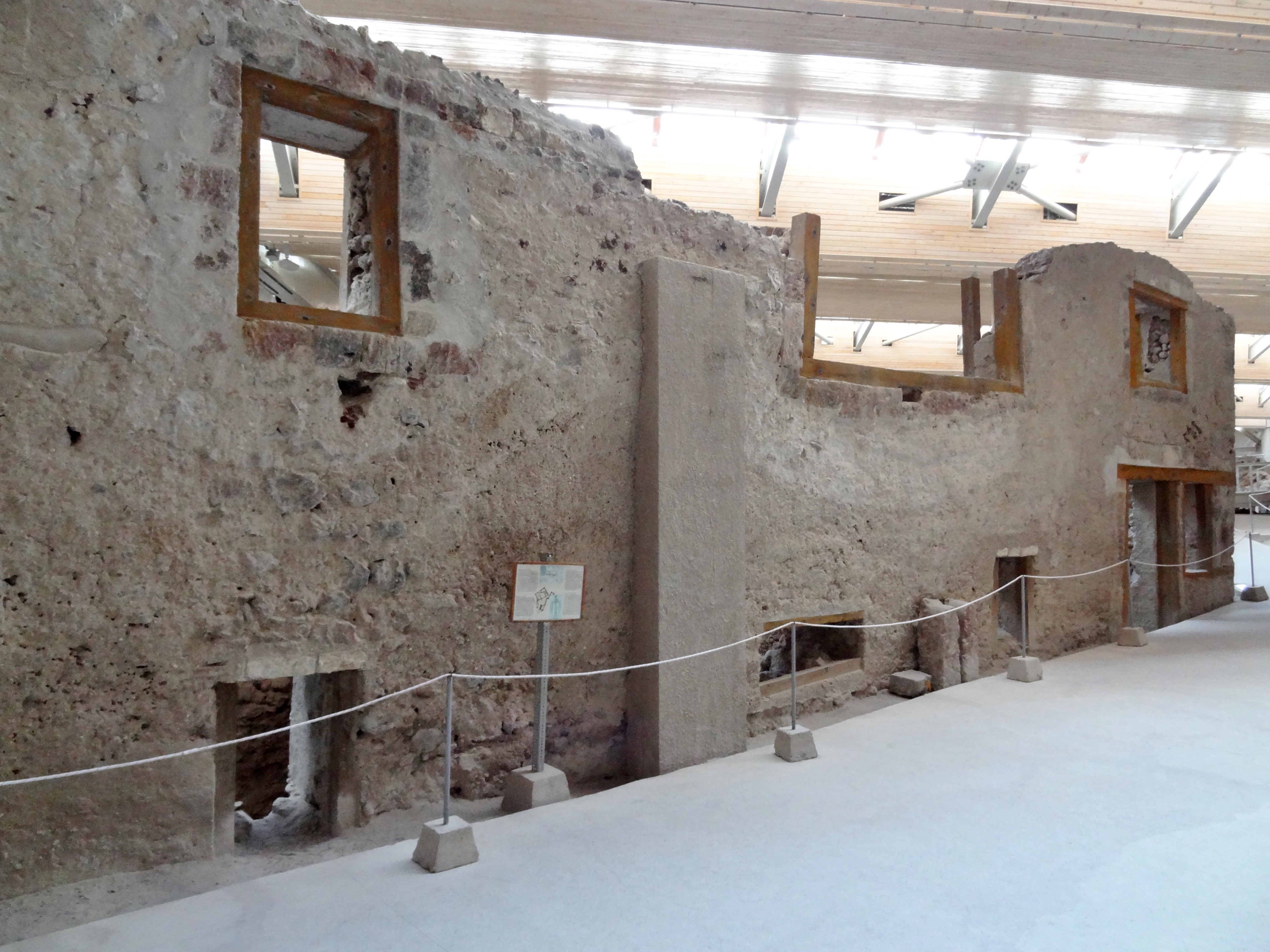 Ausgrabungsstätte von Akrotiri auf Santorin, Kykladen, Griechenland